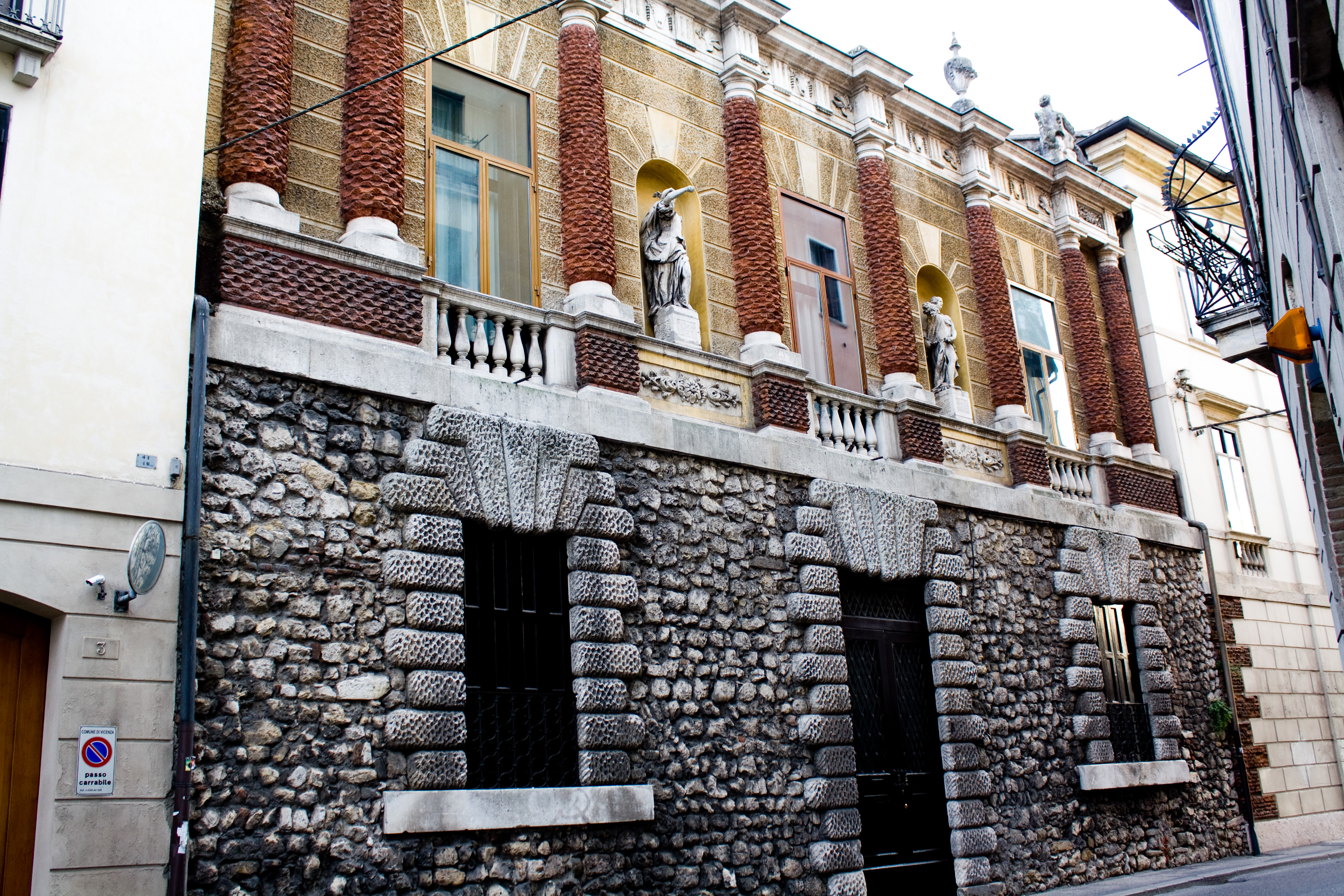 Palazzo presso il Porton del Luzo, che ingloba le mura altomedievale